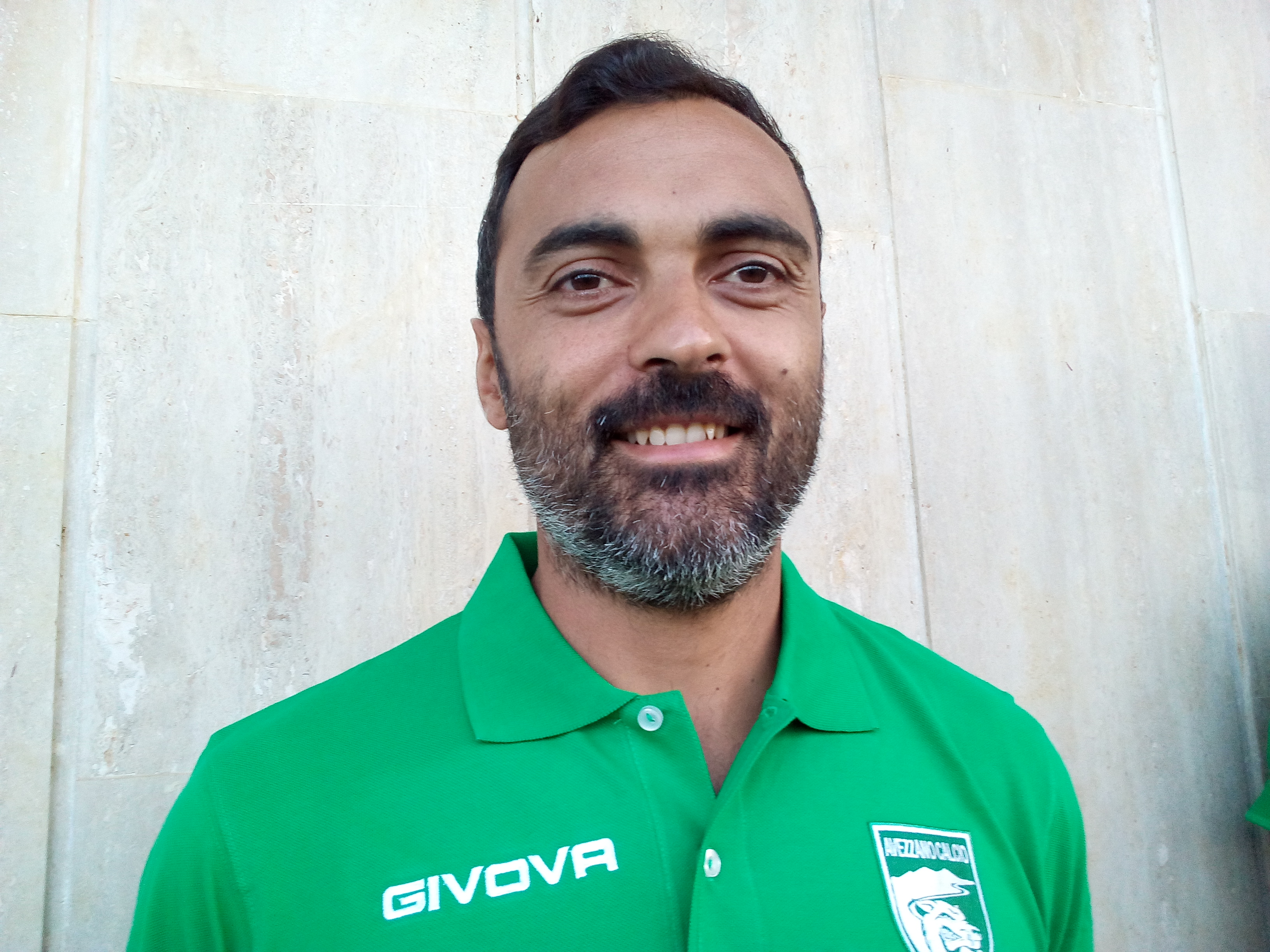 Erminio Rullo ad Avezzano nel 2017